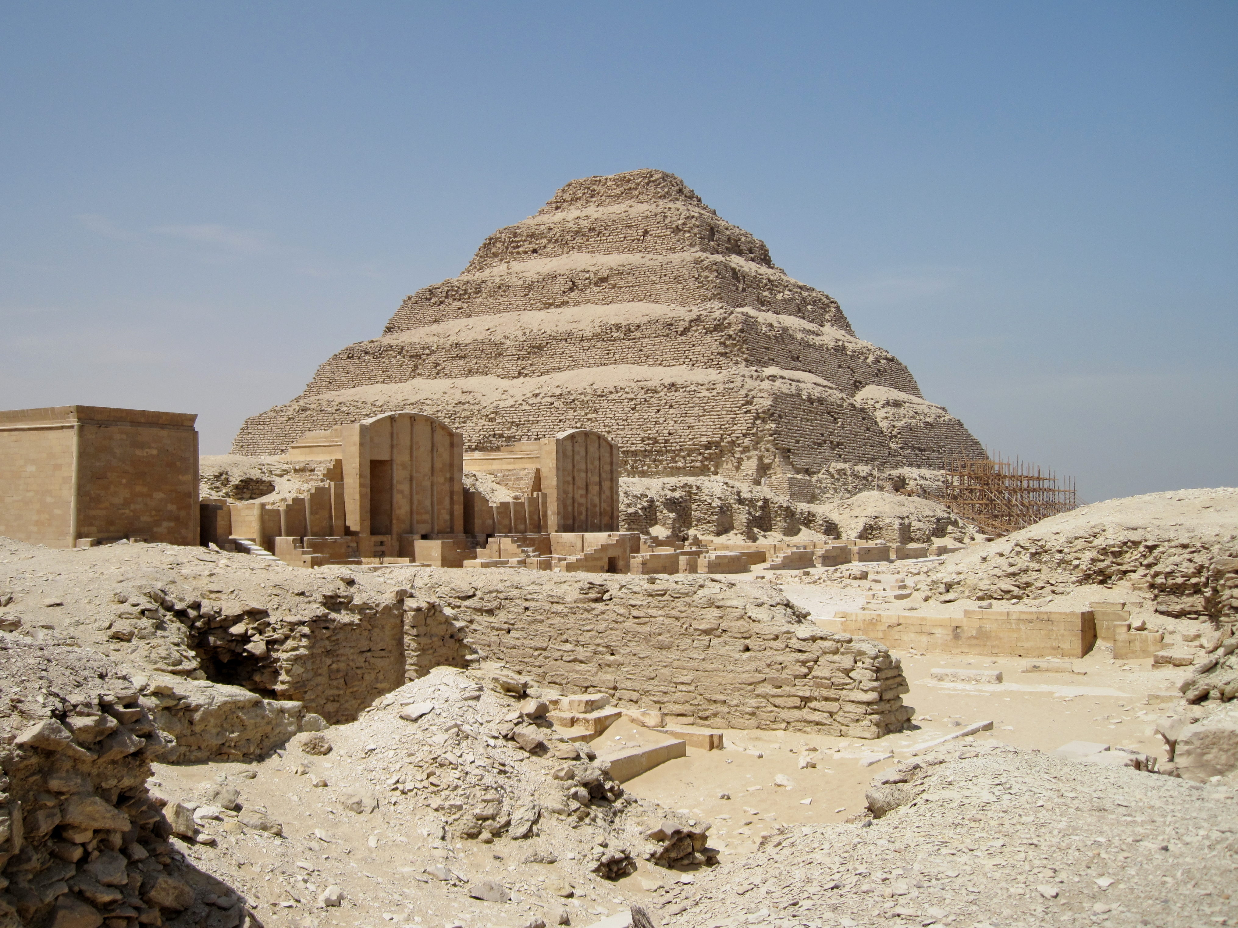 Stufenpyramide des Pharao Djoser aus der 3. Dynastie des Alten Reiches in Ägypten (um 2670 v. Chr.)